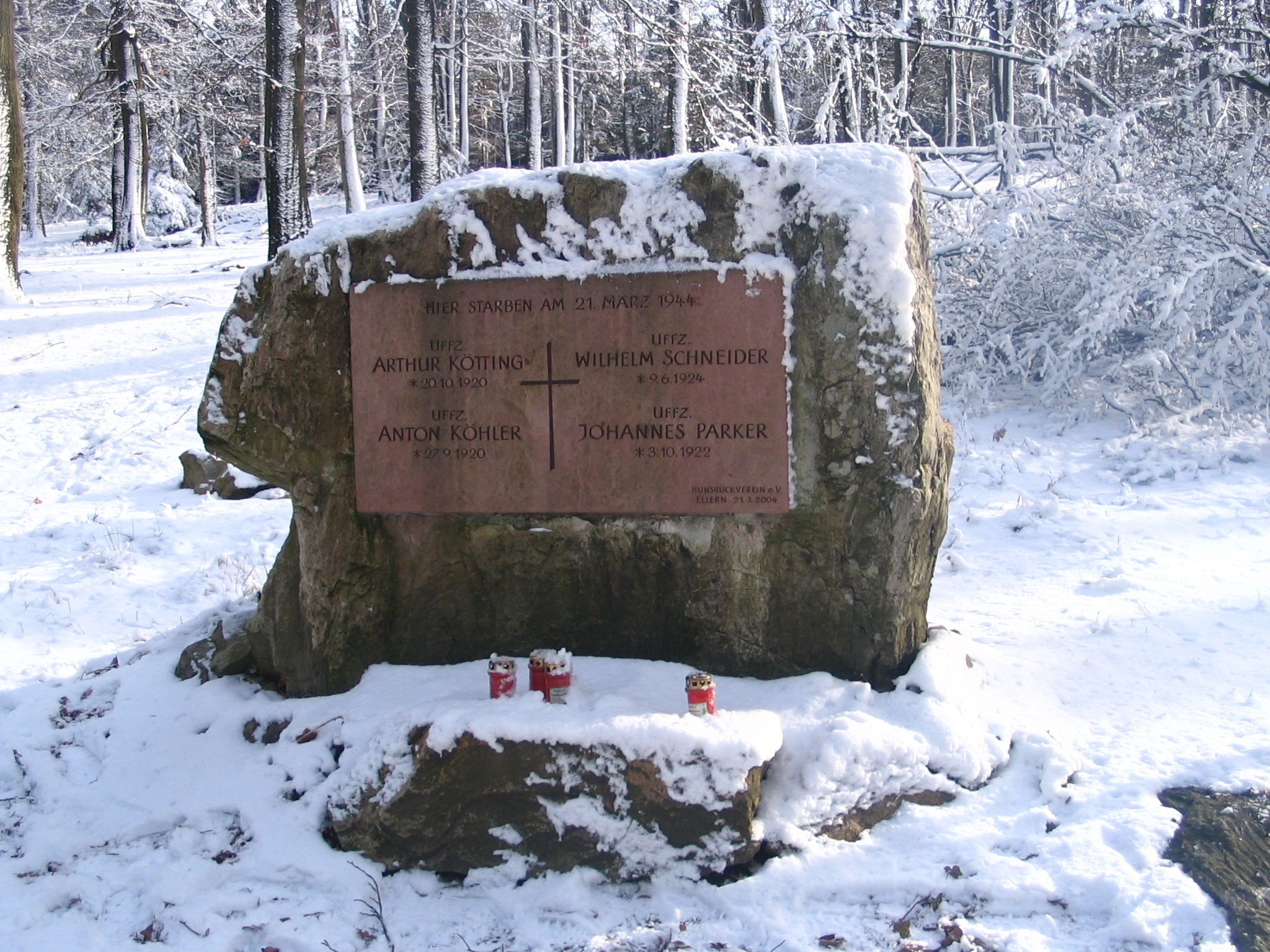 Gedenkstein an die Besatzung eines 1944 abgestrürzten WW-2 Flugzeugs im Soonwald bei Ellern